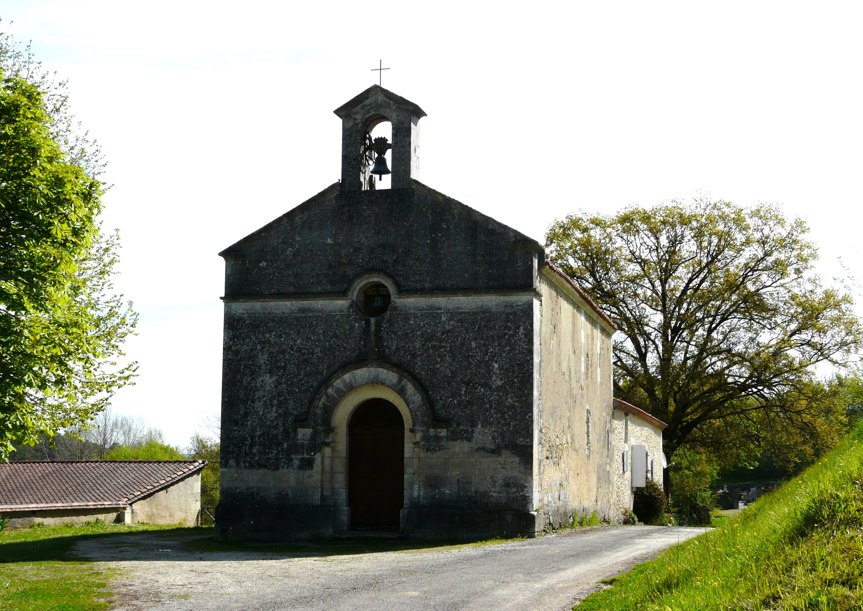 Église Saint-Symphorien de Sencenac, Sencenac-Puy-de-Fourches, Dordogne, France Object location45° 18′ 37.2″ N, 0° 41′ 52.2″ E